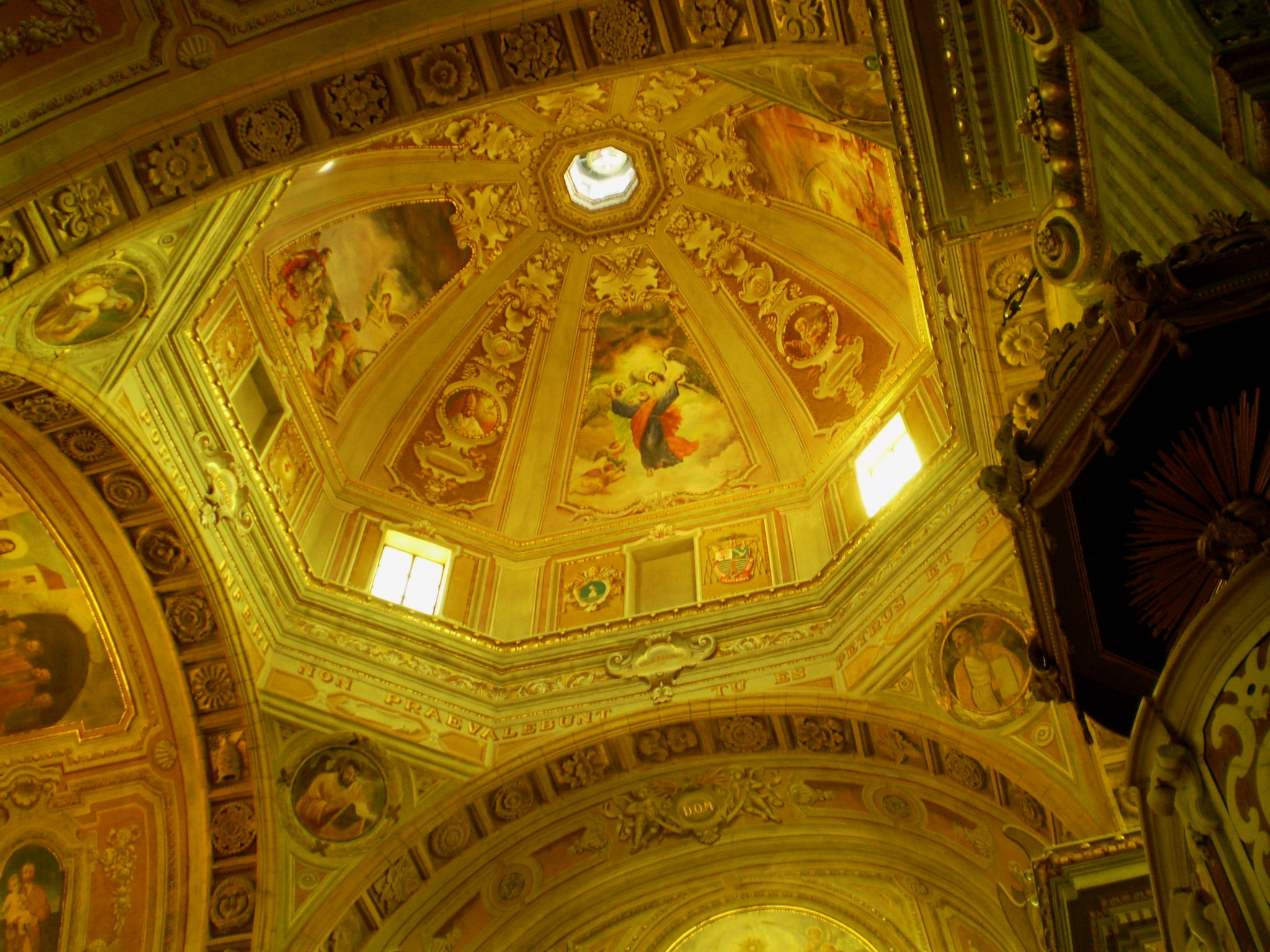 Cattedrale di Ales - Interno